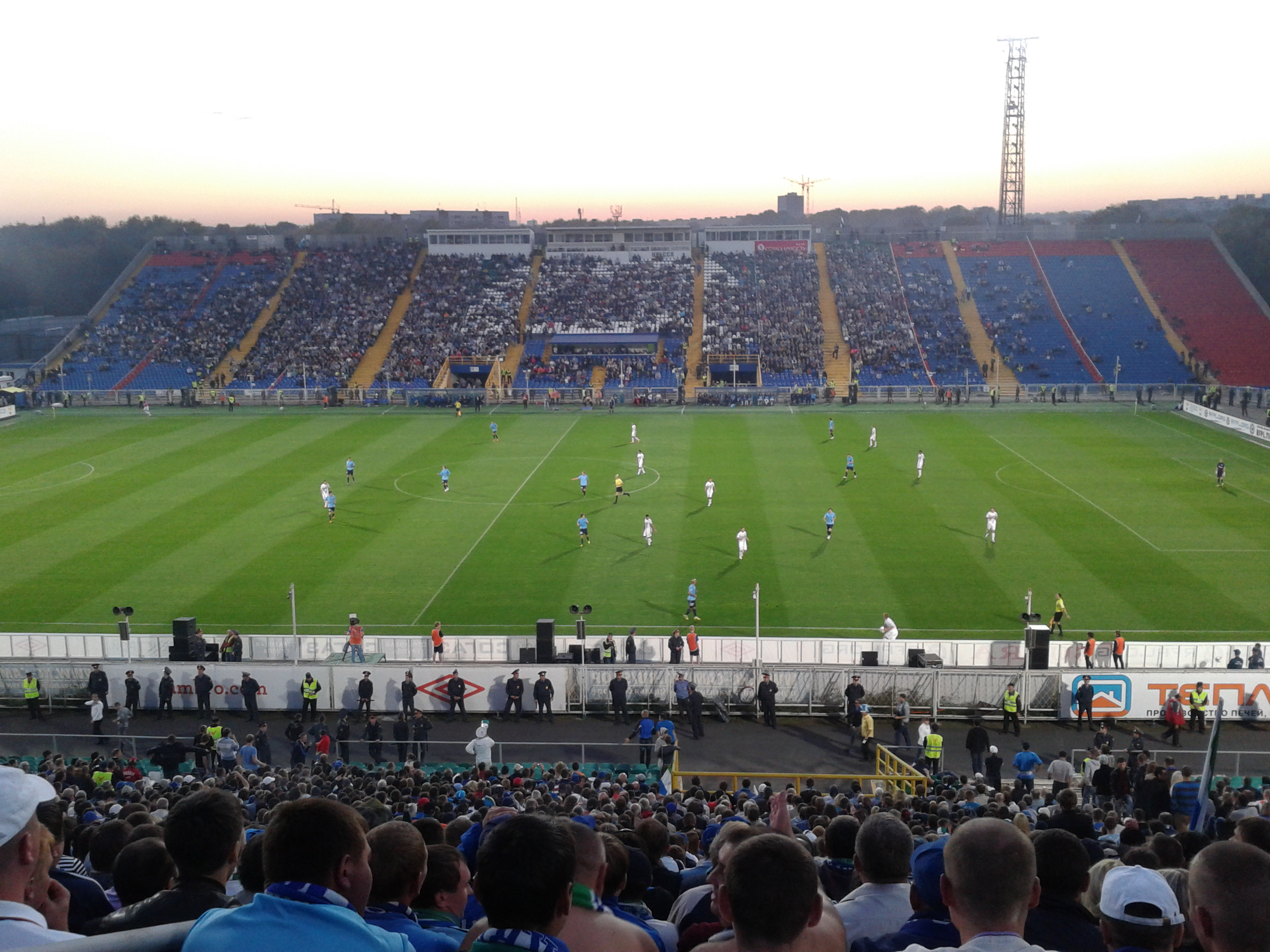 Стадион Металлург. Матч 9-тура РФПЛ 2012/2013 — Крылья Советов - Зенит